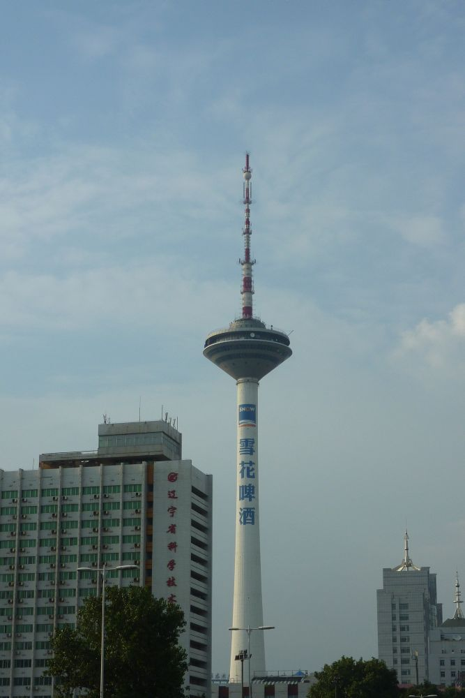 Der Fernsehturm von Shenyang